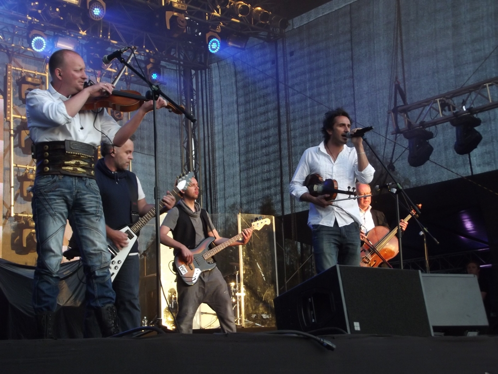 Zdjęcie zrobione podczas Festiwalu Energii, nad zalewem Sosina w Jaworznie.